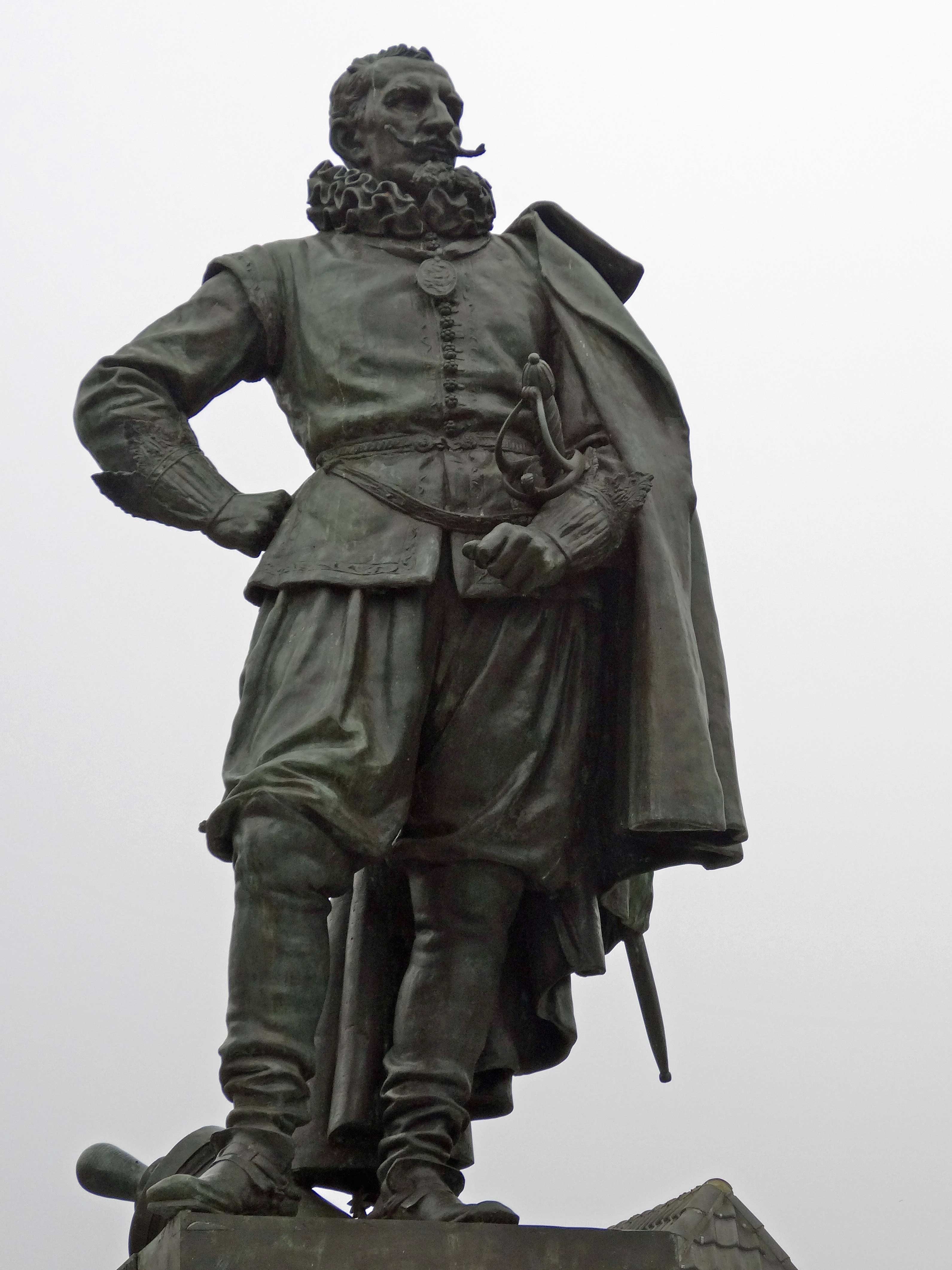 Jan Pieterszoon Coen door Ferdinand Leenhoff Hoorn